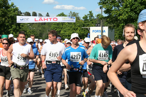 Suvi-illan Maraton kesäkuussa Forssassa